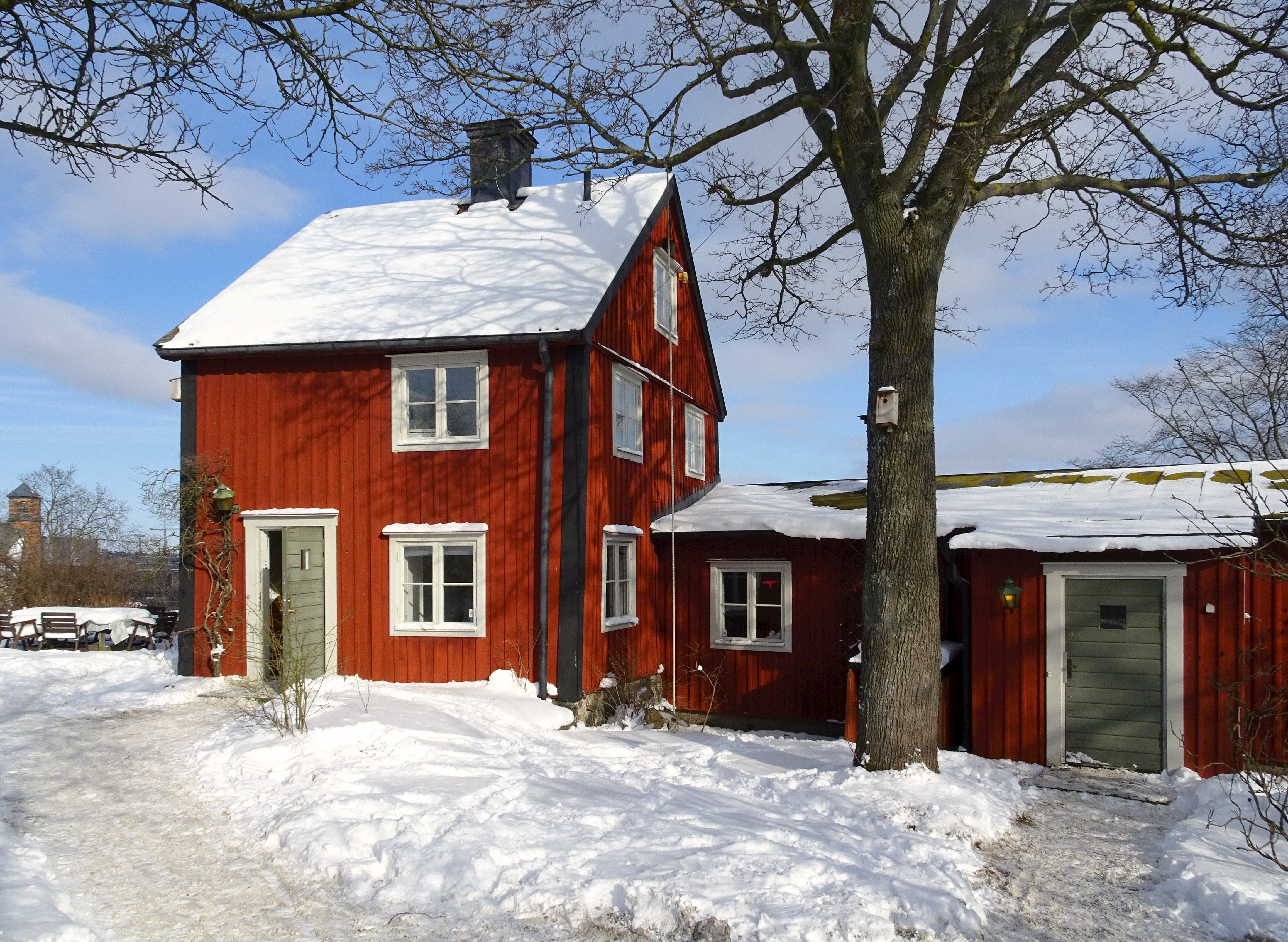 Gamla Lundagatan 14, även kallat Titzens fåfänga eller Ensamma huset, är ett bostadshus vid Gamla Lundagatan 14 på Skinnarviksberget på Södermalm i Stockholm.